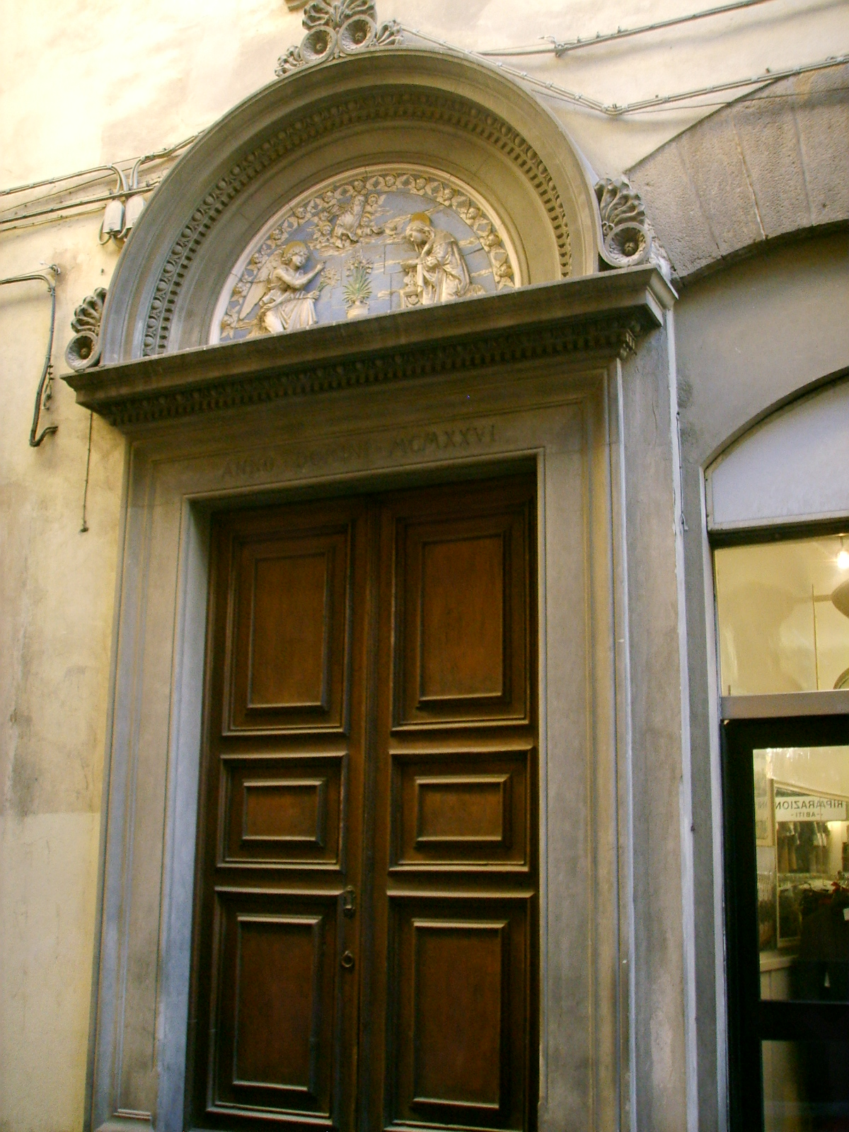 Portale_Via_dello_studio